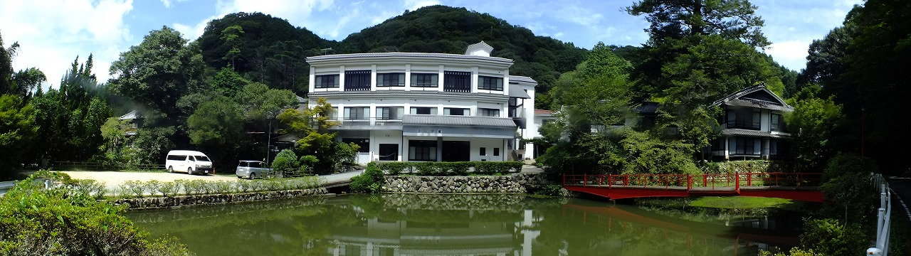 2015-10-01 Sioda-Onsen Ueyama Ryokan（湯元上山旅館）